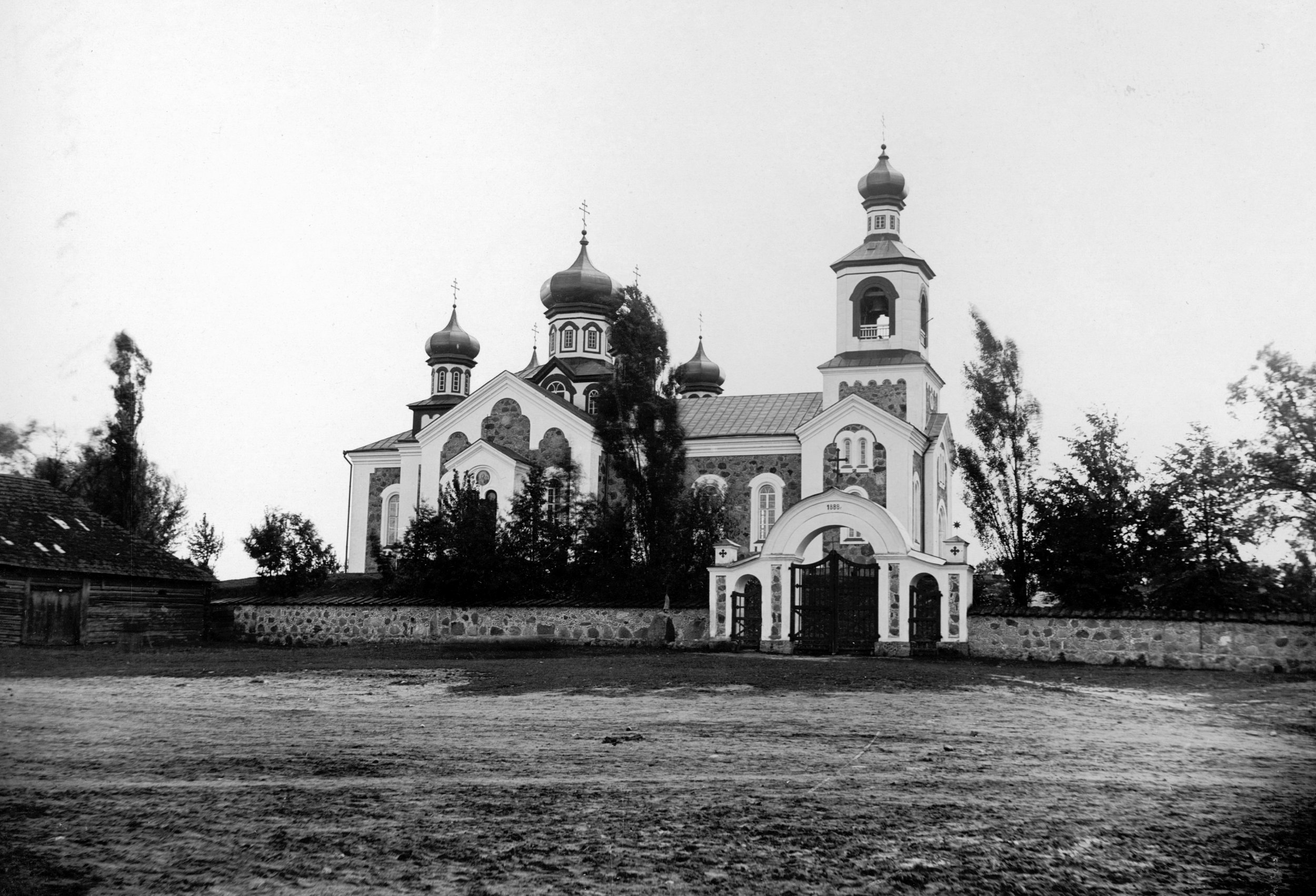 Беларуская (тарашкевіца): Турэц (Turec), пляц Рынак (plac Rynak). Пакроўская царква-мураўёўка